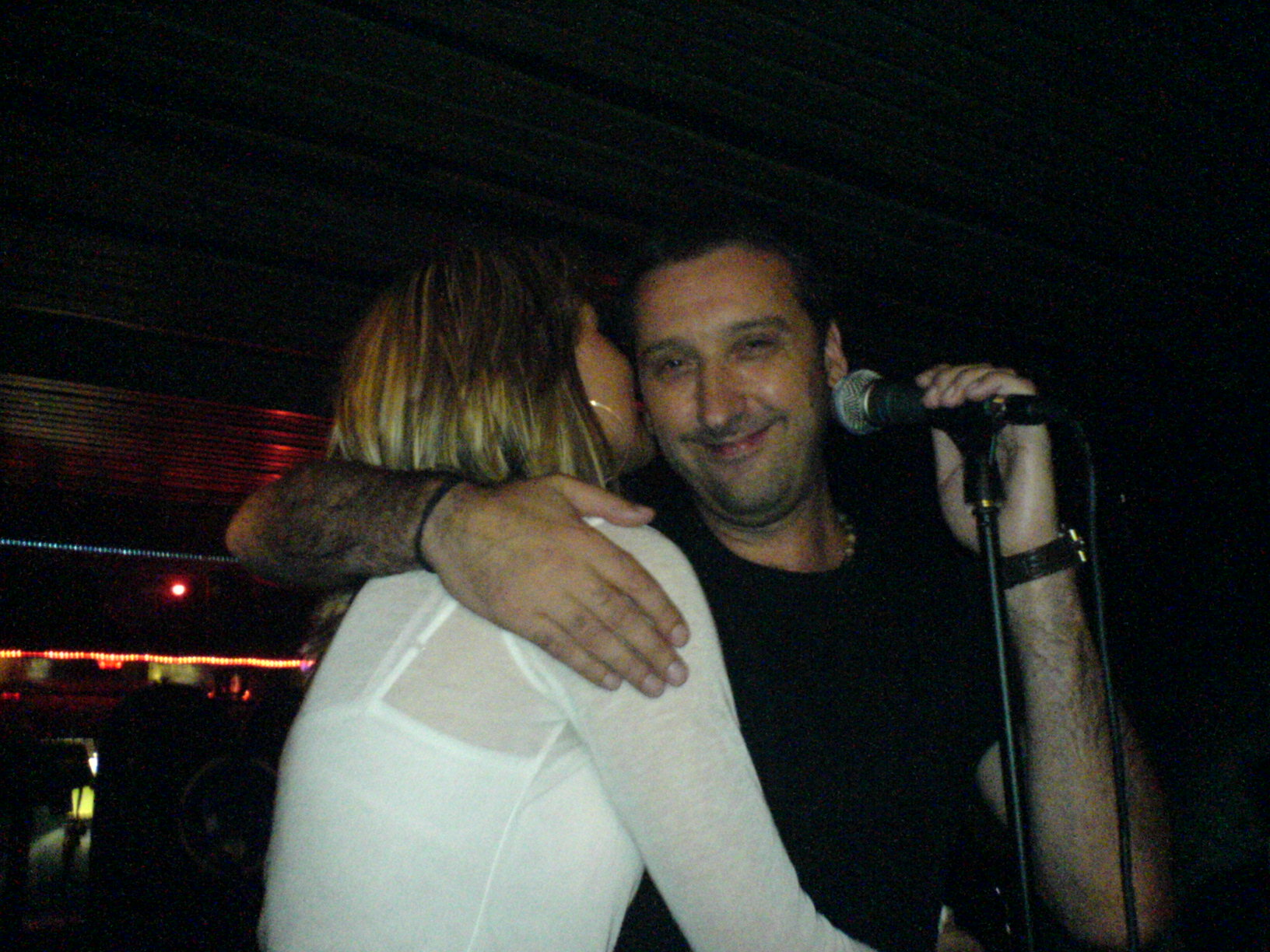 Hari Varešanović durante un concerto tenuto il 22 settembre 2006 a Mezzovico